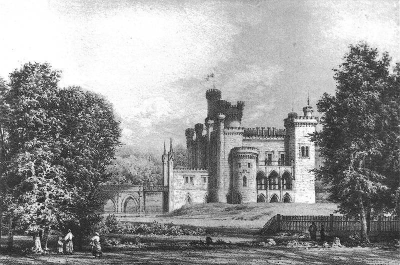 Zamek kórnicki, Wielkopolska